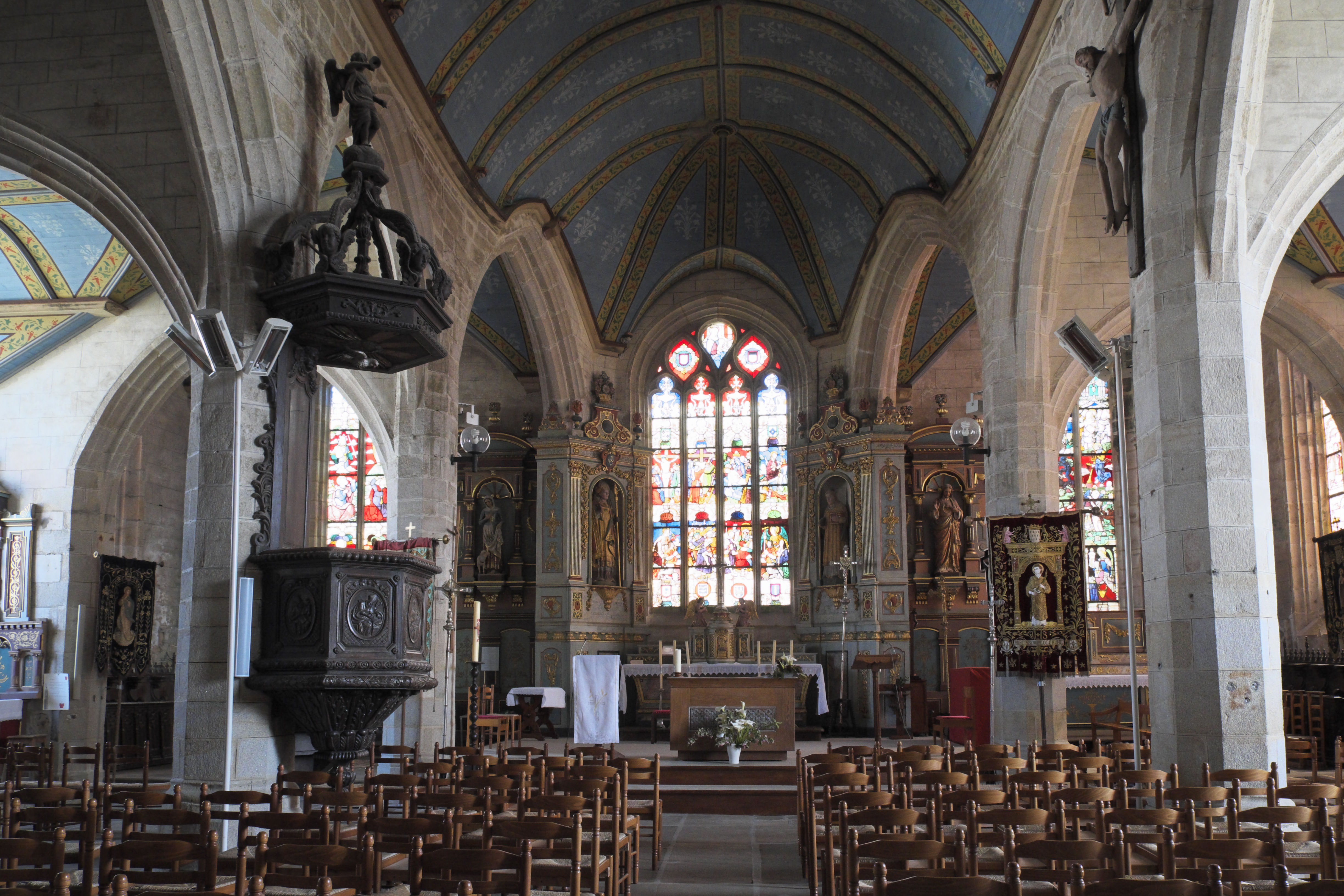 Katholische Pfarrkirche Saint-Thurien in Plogonnec im Département Finistère (Region Bretagne/Frankreich), Innenraum